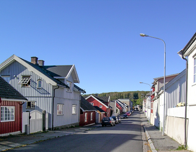 Jægersborggata, Larvik, Norway.